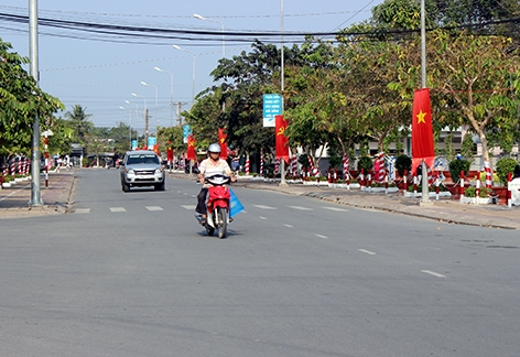 Đường Phạm Hùng